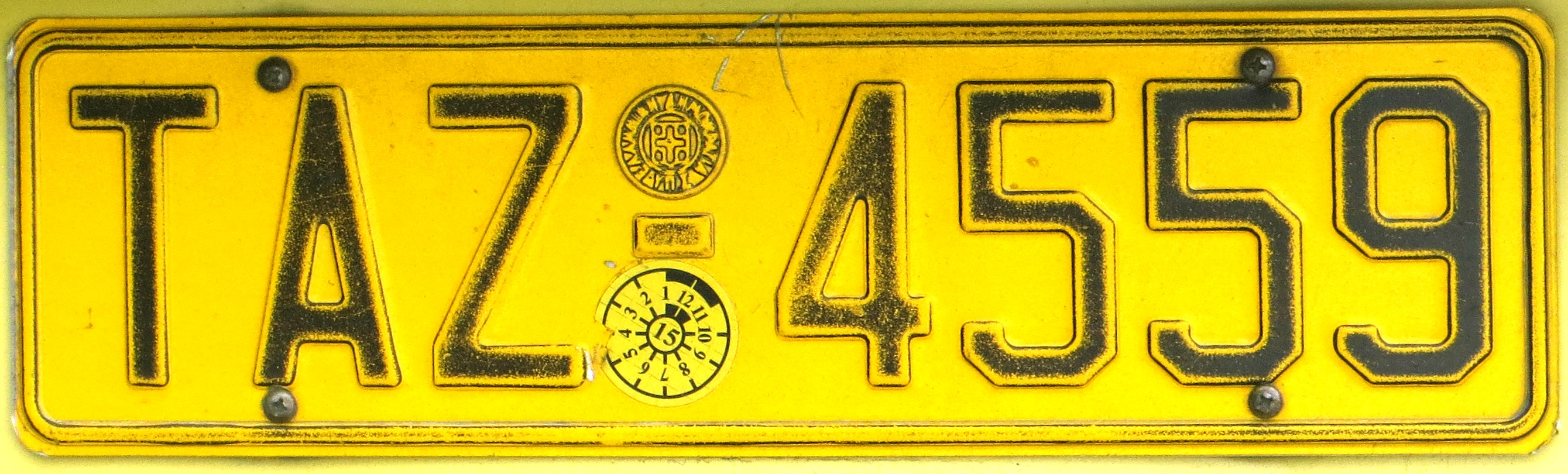 Taxi kentekenplaat Griekenland